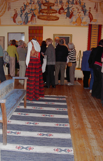 Matta formgiven av Ida Sahlström.